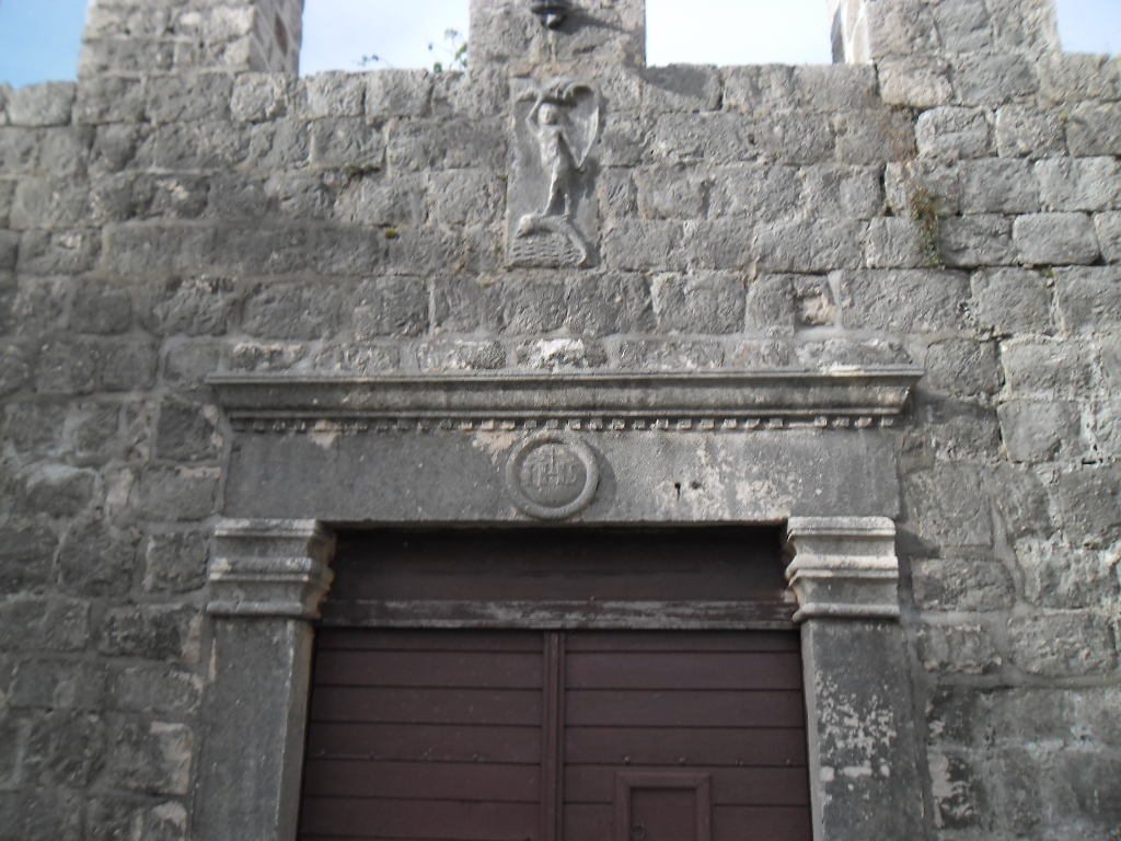 ulaz u ljetnikovac Skočibuha u Suđurađu na otoku Šipanu